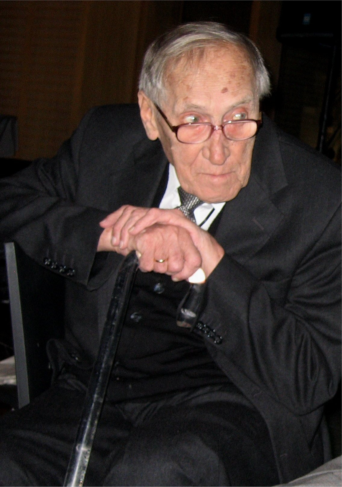 Leszek Kołakowski (1927-2009), Polish philosopher